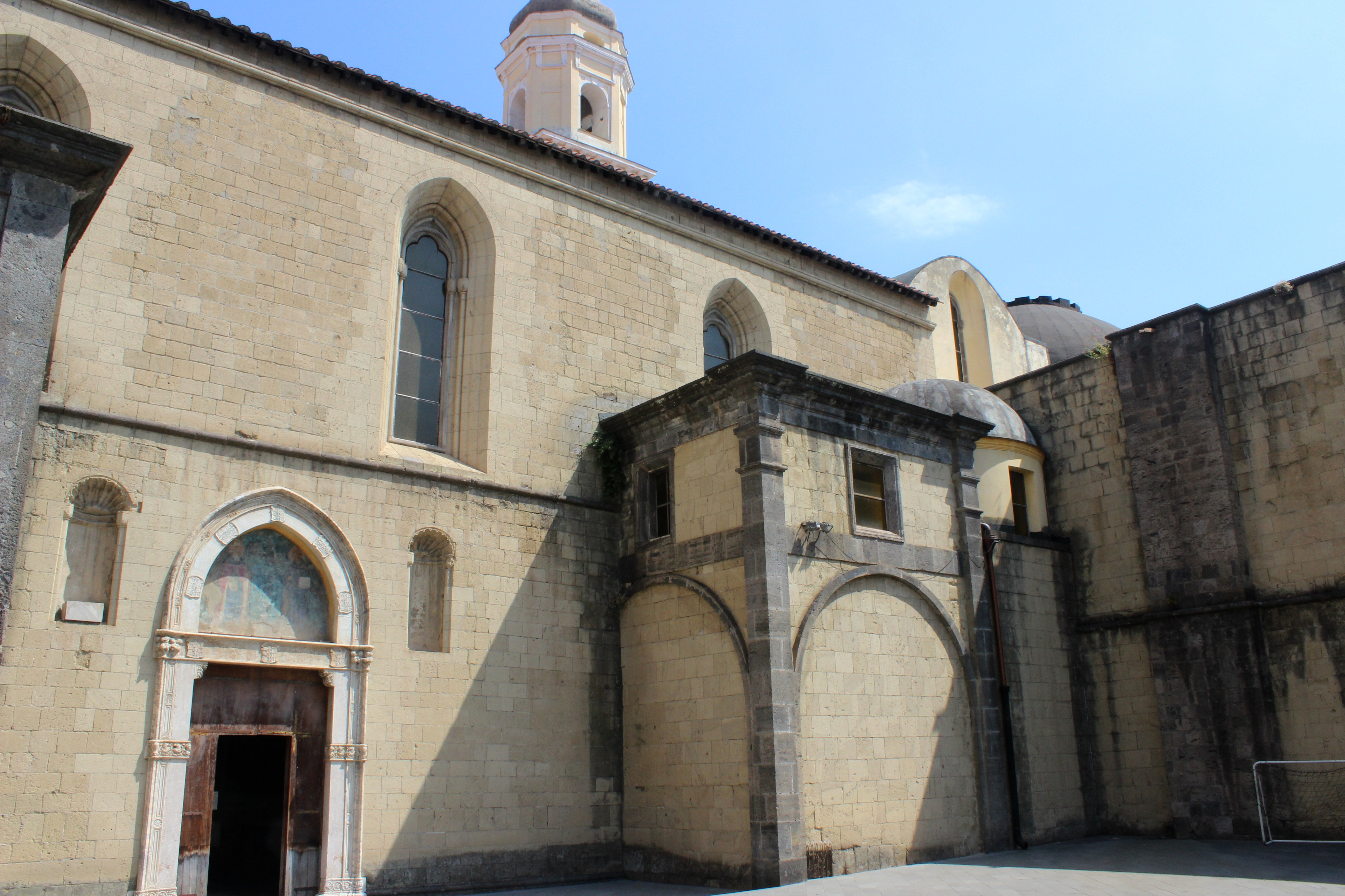 Nápoles. San Giovanni a Carbonara. Exterior.